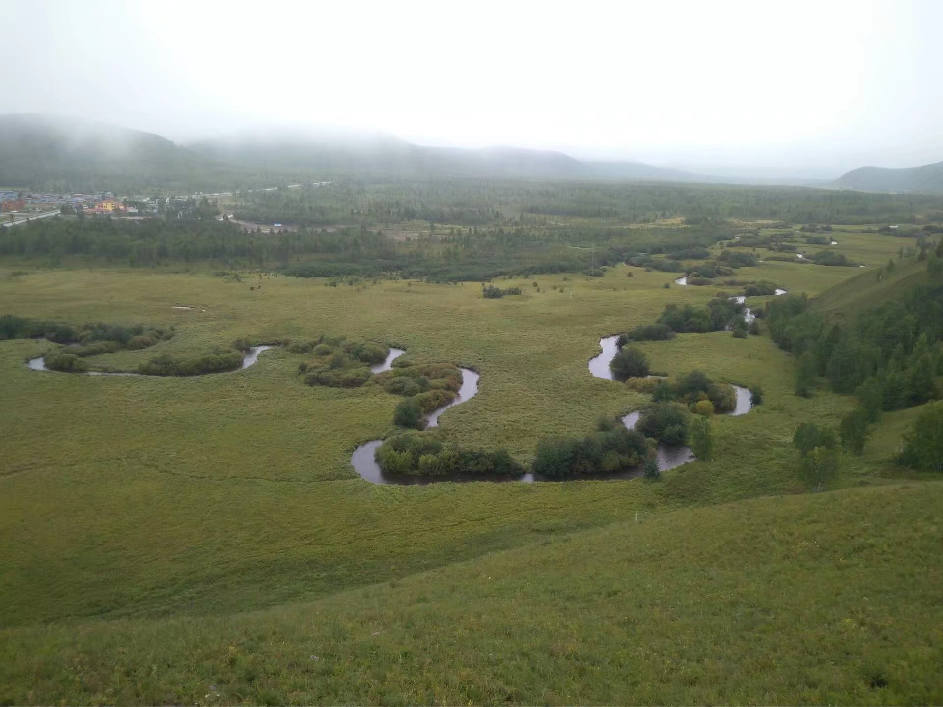 中文（中国大陆）: 额尔古纳哈乌尔河景区